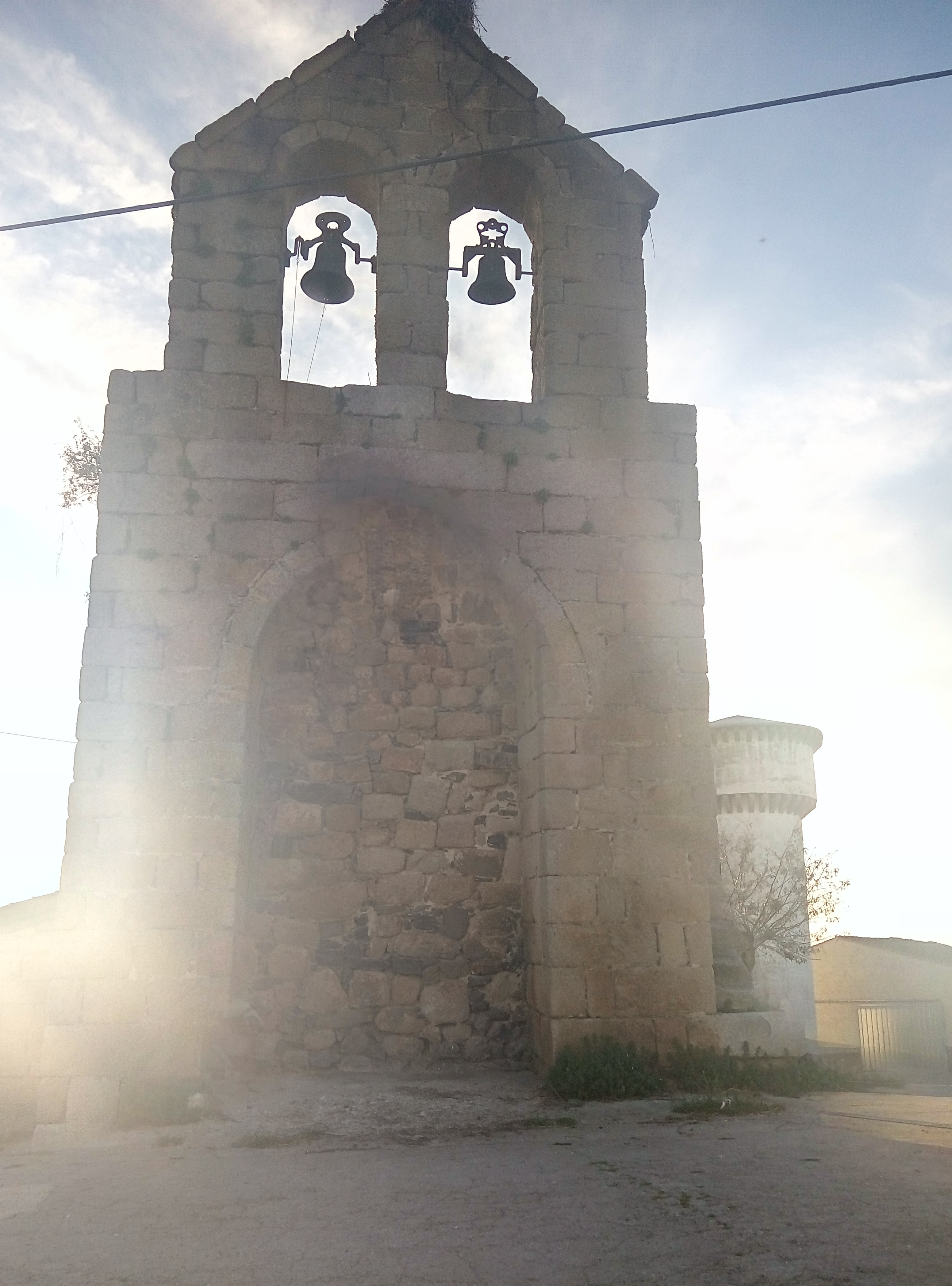 Portada al este, cegada. Iglesia de Santa Columba, en Barquilla.